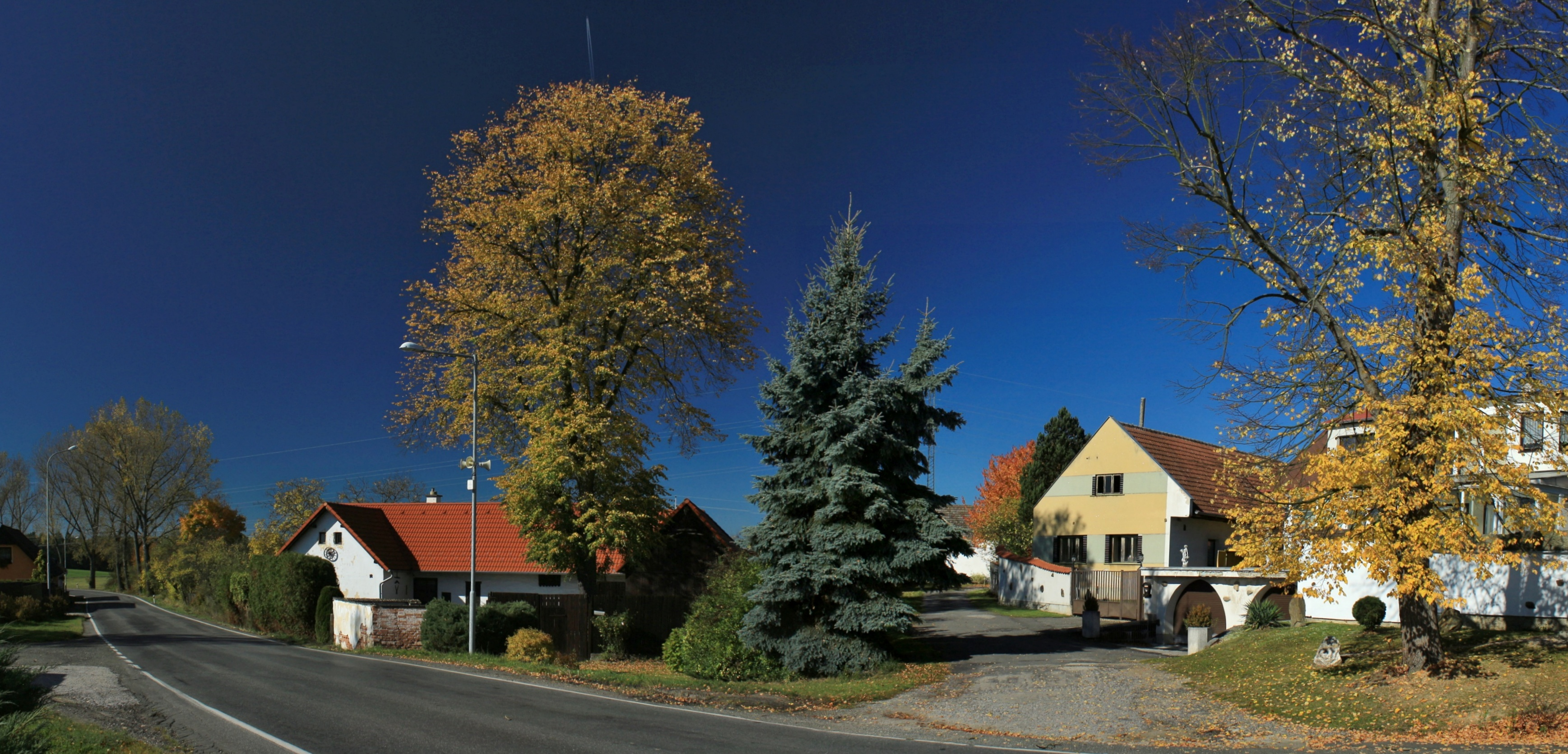 Všechlapy náves